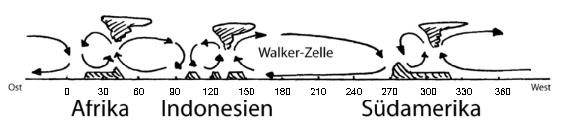 Schematische Darstellung der Walker-Zirkulation